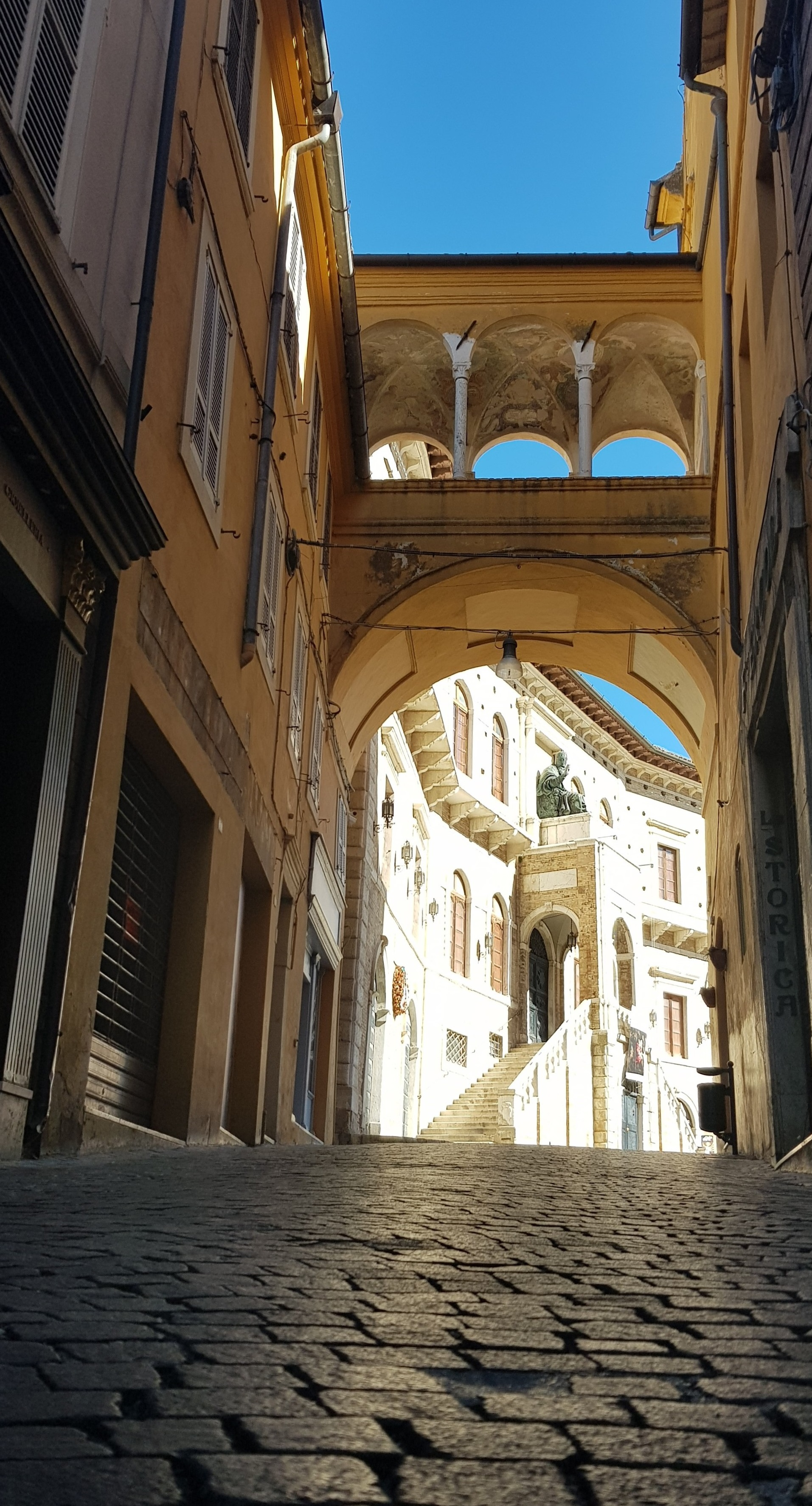 Palazzo dei Priori, visto arrivando dal Corso Cefalonia e passando sotto il "passetto" della Biblioteca, che connette appunto i due edifici. This is a photo of a monument which is part of cultural heritage of Italy.